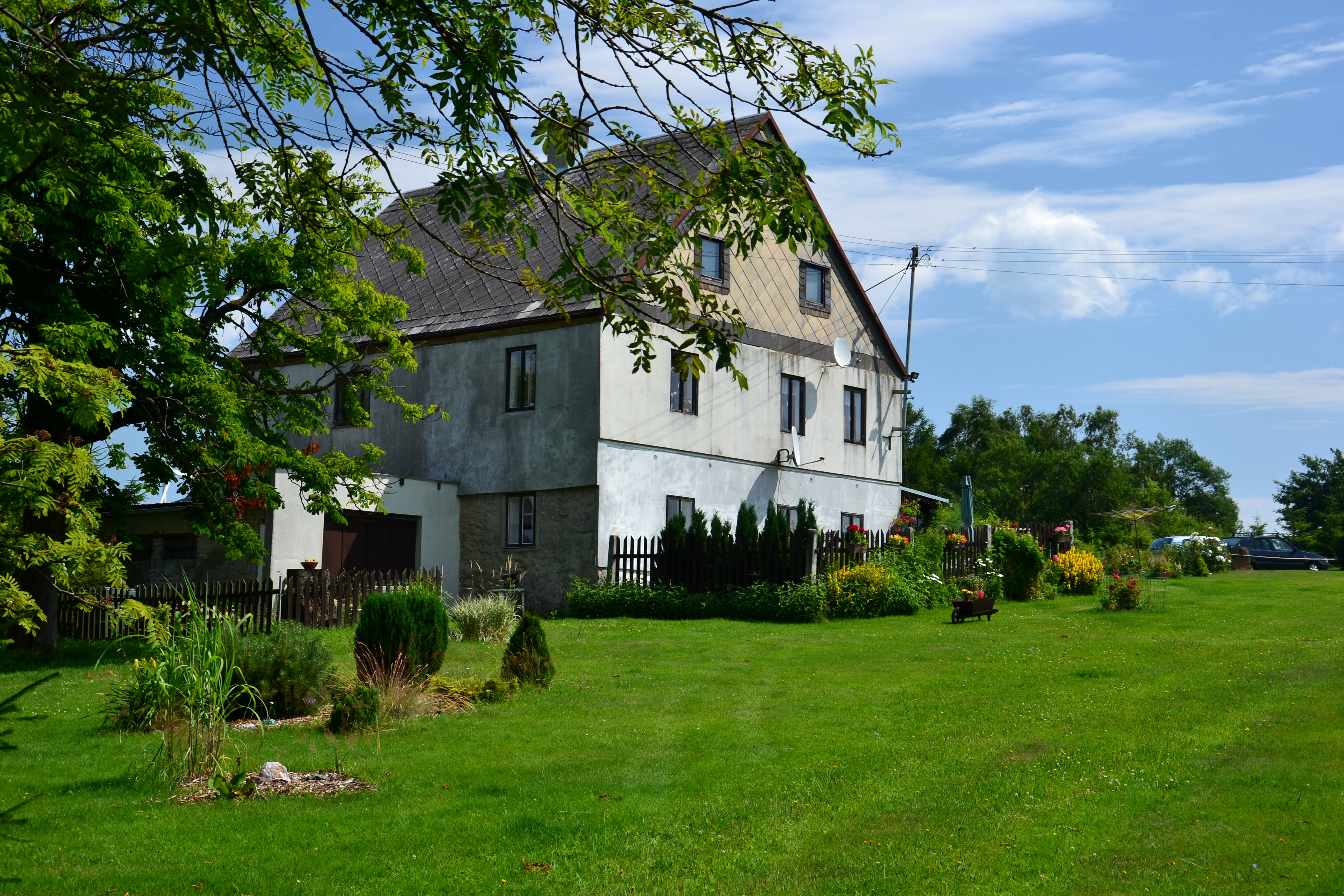 Kotlina – jeden z dochovaných domů